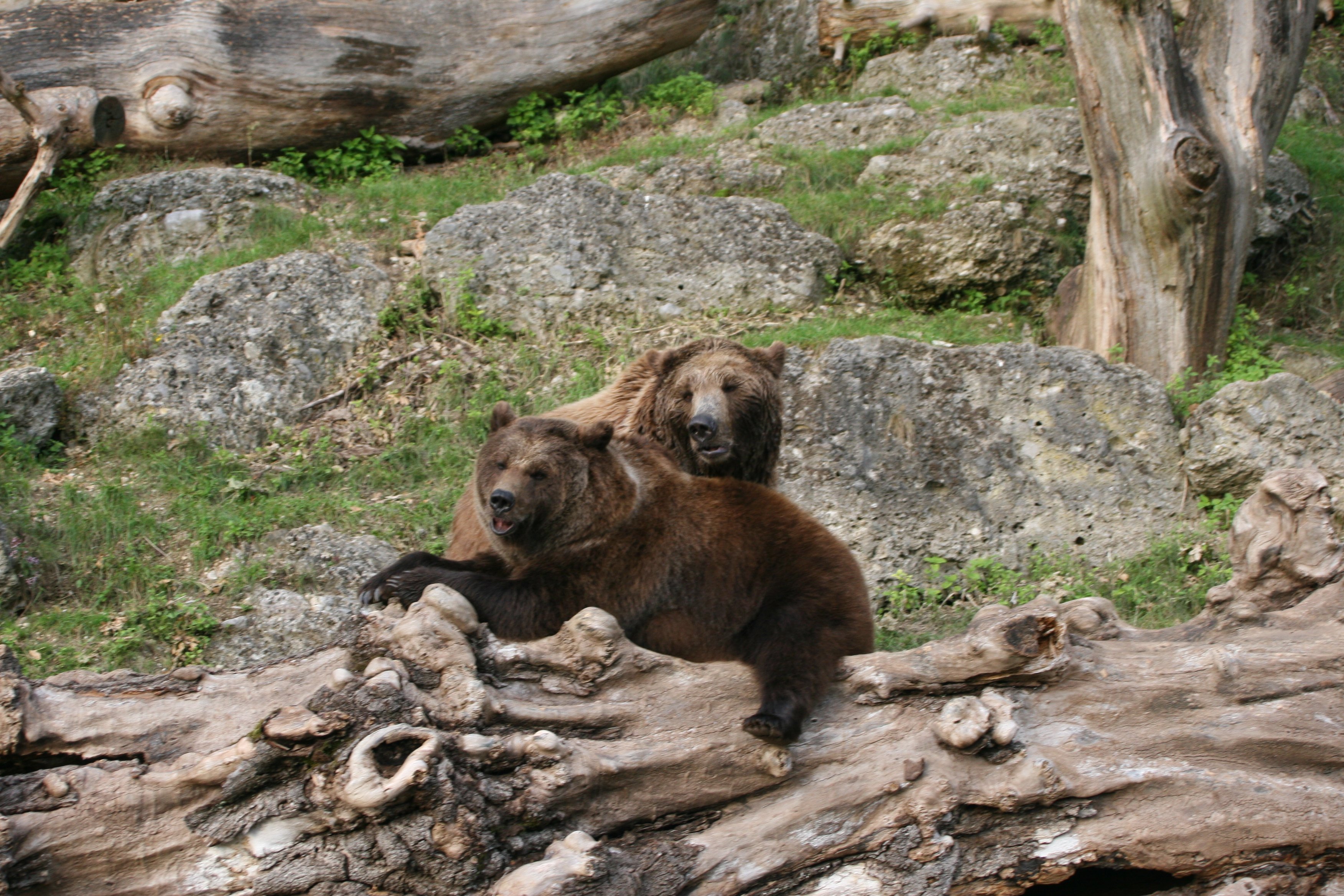 Bären im Zoo Salzburg